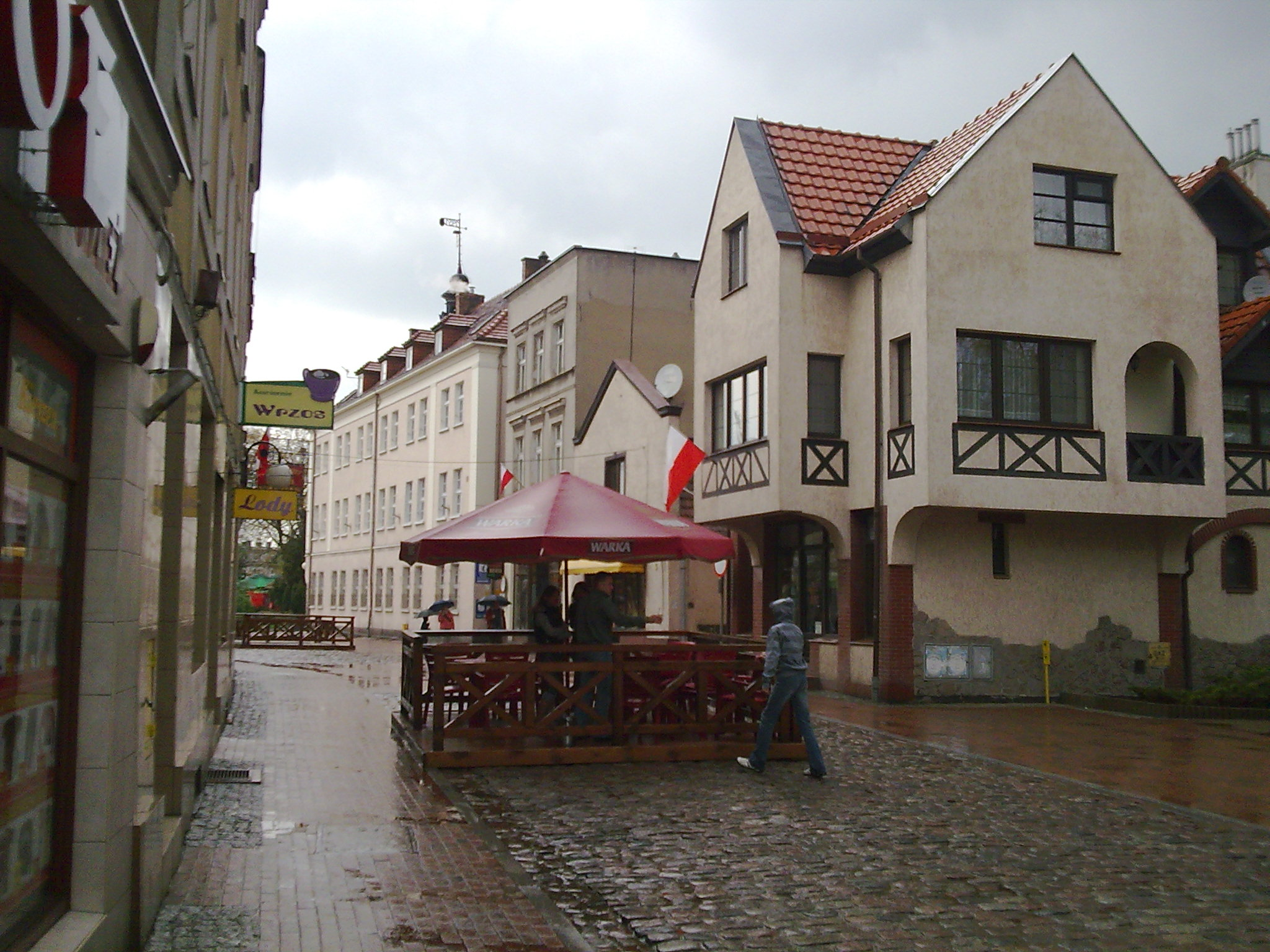 Ulica Wryczy prowadząca do Placu Wolności